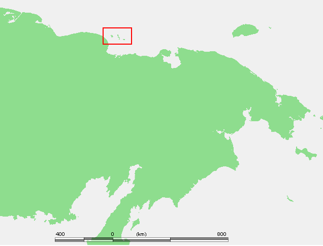 Bear islands - медвежьи острова